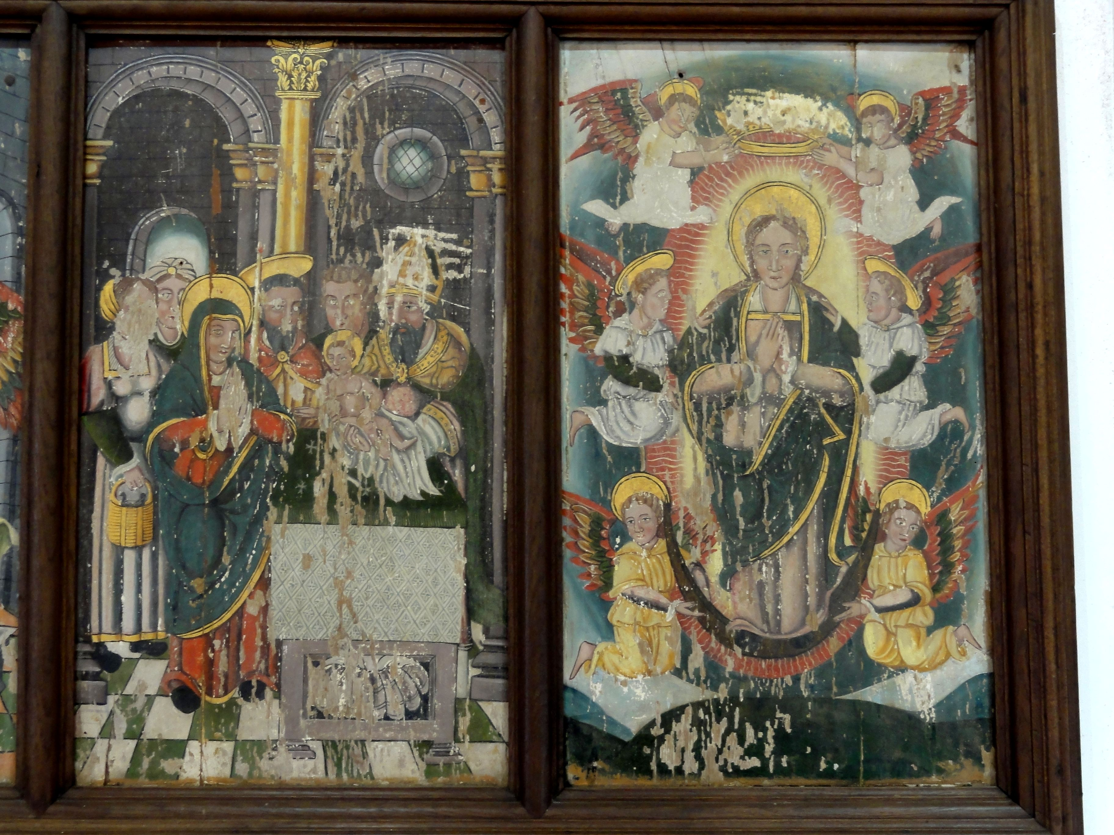 Retable - scènes de la vie de la Vierge, Présentation au Temple et Assomption.